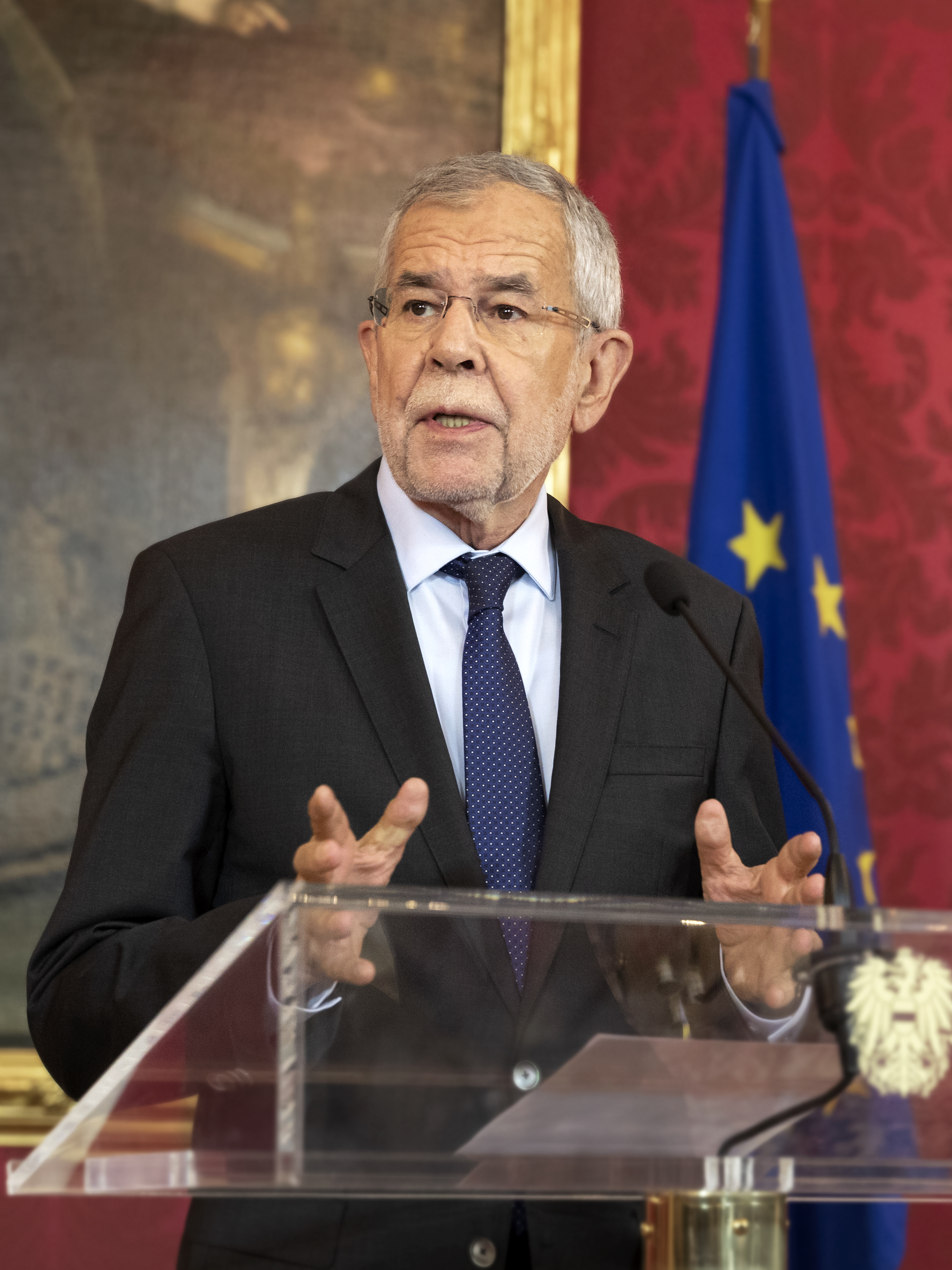 Alexander Van der Bellen bei einer Rede in der Hofburg.